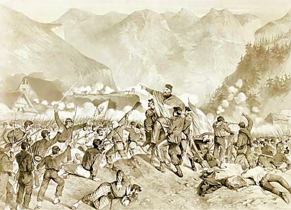 Garibaldi a Bezzecca, litografia